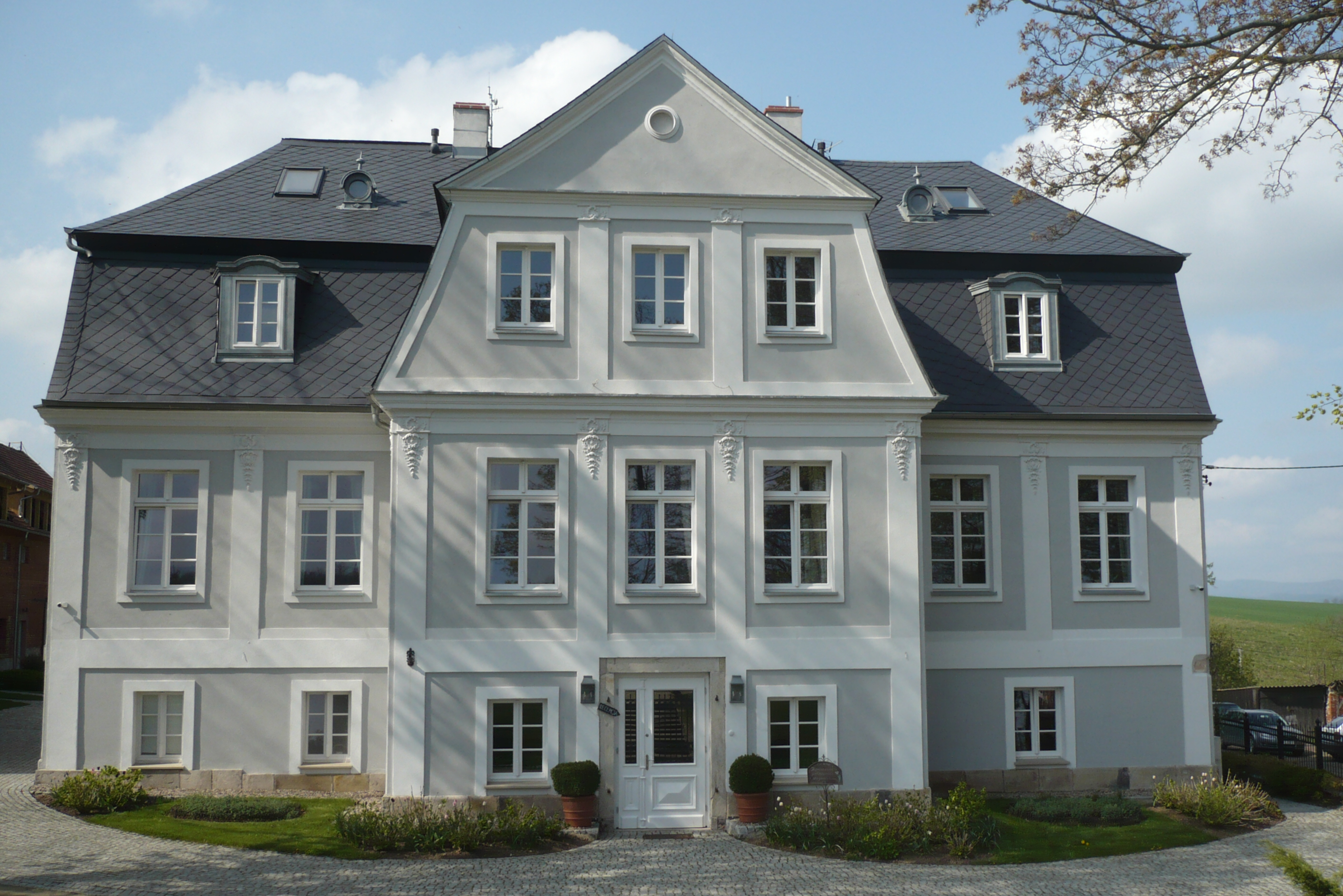 Kamieniec. Pałac